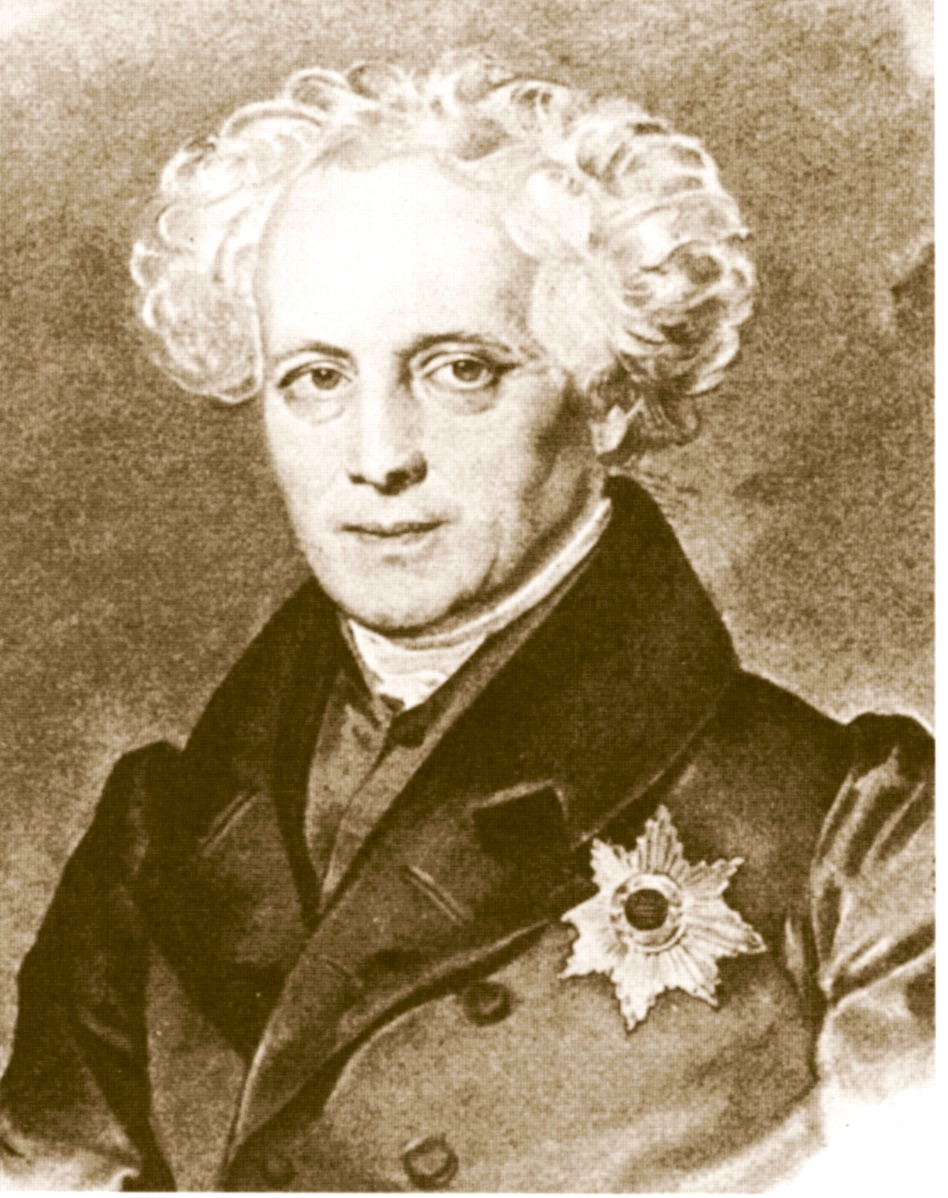 Ludwig Minnegerode, Regierungsdirektor in Arnsberg und Hofgerichtspräsident in Darmstadt